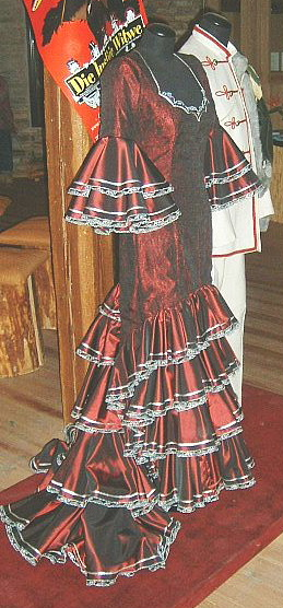 Operettenkostüme für die Operette Die Fledermaus. Ballkleid und Uniform